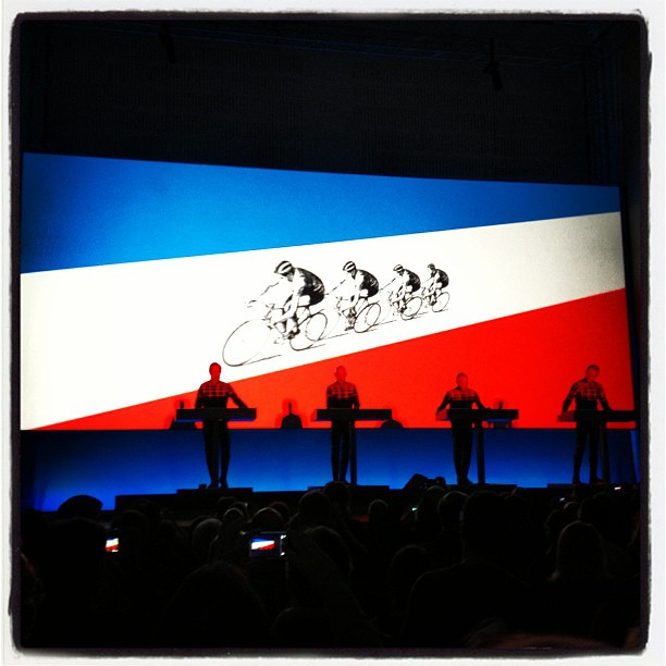 Das volle Programm Kraftwerk via Instagram instagr.am/p/UW2aGTArL3/